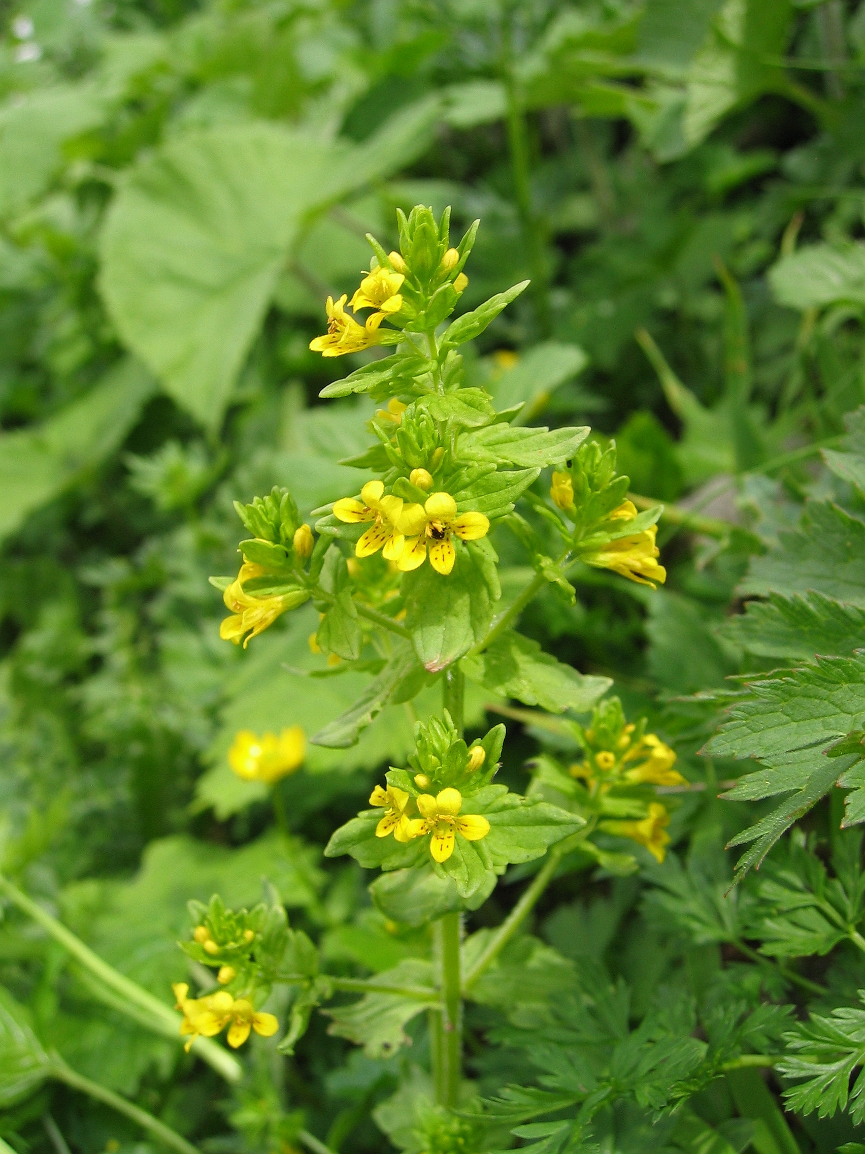 Tozzia alpina, In den Wiesen (near Wildgössl), Styria, Austria